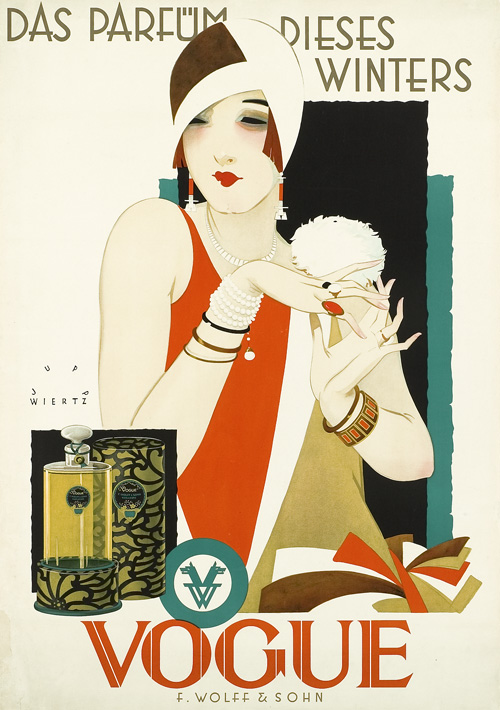 Das hier abgebildete Plakat (ohne Kennzeichnung der Druckerei) in den Maßen circa 119,7 x 84,3 cm, aufgrund kleiner Altersfehler im Jahr Oktober 2015 angeboten für lediglich noch 8.500,-- Euro, entwarf der Künstler Jupp Wiertz in den Jahren um 1926/27 für das seinerzeit in Karlsruhe ansässige, zeitweilig Parfümerie- und Toilettenseifenfabrik F. Wolff & Sohn genannte Kosmetikunternehmen. Die Darstellung gilt als einer der Höhepunkte im Schaffen des Grafikers, ja der damaligen Plakatkunst überhaupt. Die Botschaft unter dem Titel „Das Parfüm dieses Winters - Vogue“ stellt weniger auf das in einem edlen Flakon präsentierte Parfüm ab als mehr auf das Lebensgefühl und dessen eleganten Ausdruck in der dargestellten, trotz des Winters nur leicht bekleideten jungen Dame der Goldenen Zwanziger Jahre - zumindest für die Glücklichen, die sich diesen Luxus nach der Deutschen Hyperinflation denn leisten konnten ...